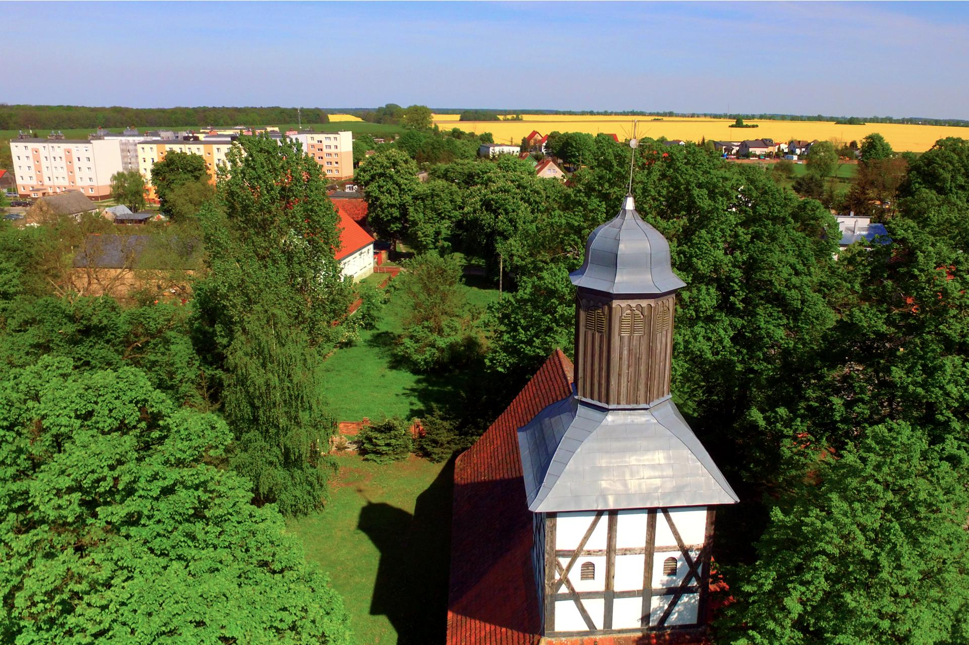 Bloki z wielkiej płyty i średniowieczny kościół w Wojcieszycach